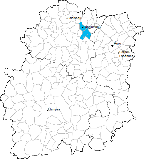 Carte de localisation du canton de Longjumeau en Essonne (91)